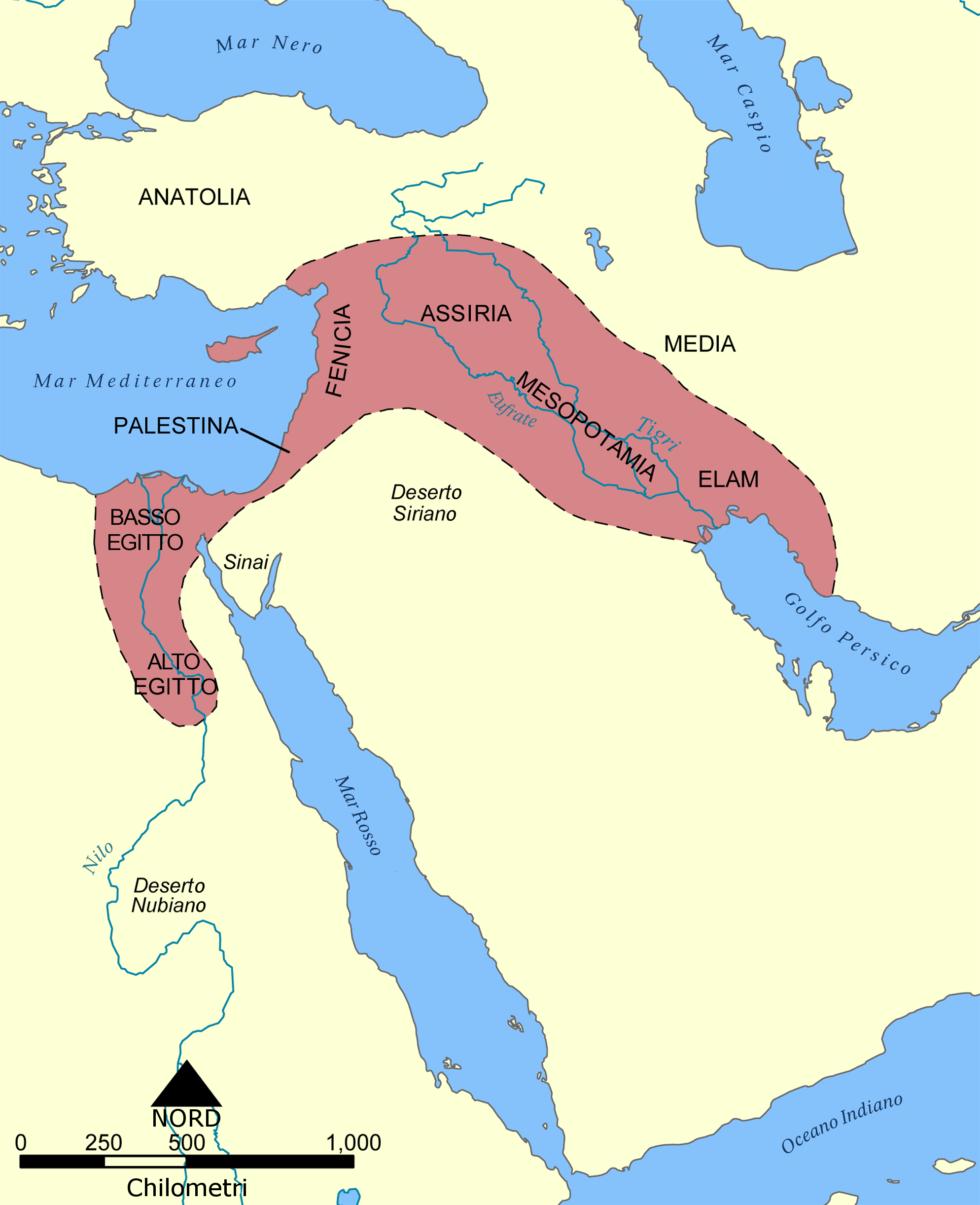 versione italiana di Fertile Crescent map.png